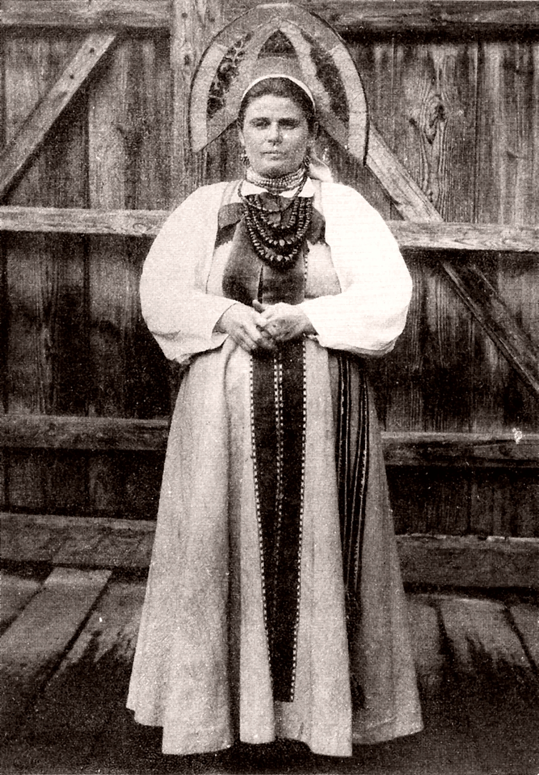 Женщина в праздничном костюме. Уфимская губ. 1911 г.